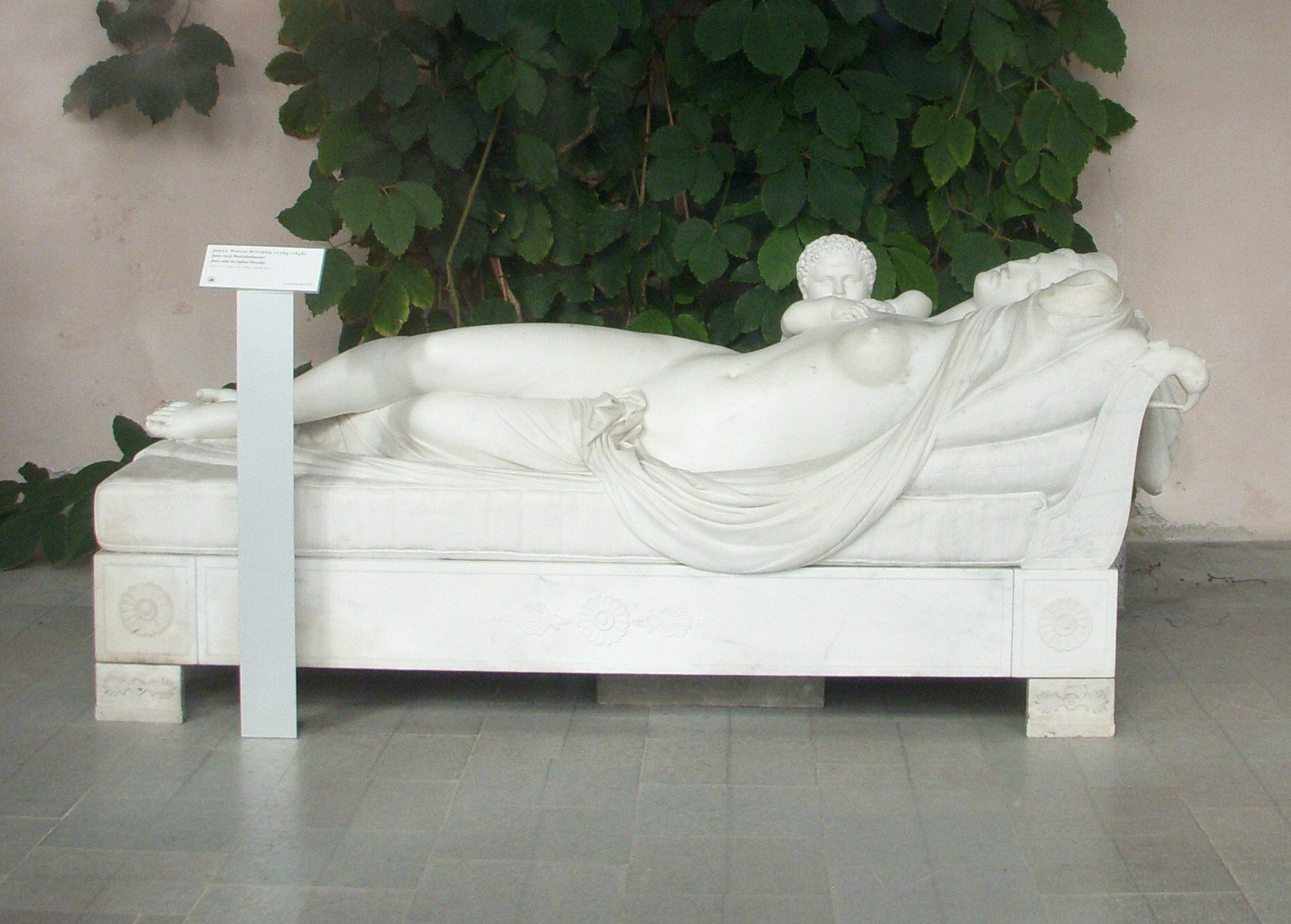 Juno med Herkulesbarnet i Orangerimuseet på Ulriksdal